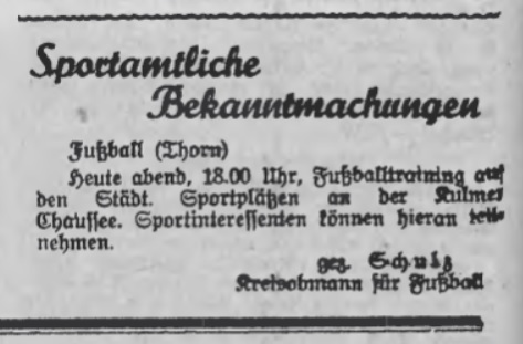 Zaproszenie na trening SV Thorn z lokalnej prasy okupacyjnej "Thorner Freiheit" z 8 maja 1940 r.